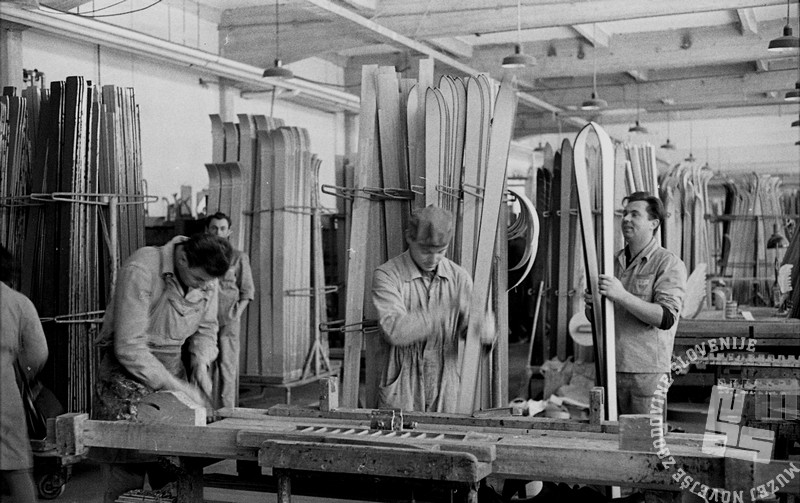 Delavci v obratu Elana, Begunje na Gorenjskem.